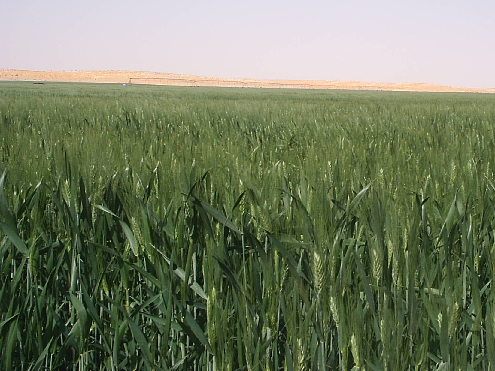 Photo d'un champ d'agriculture à Adrar